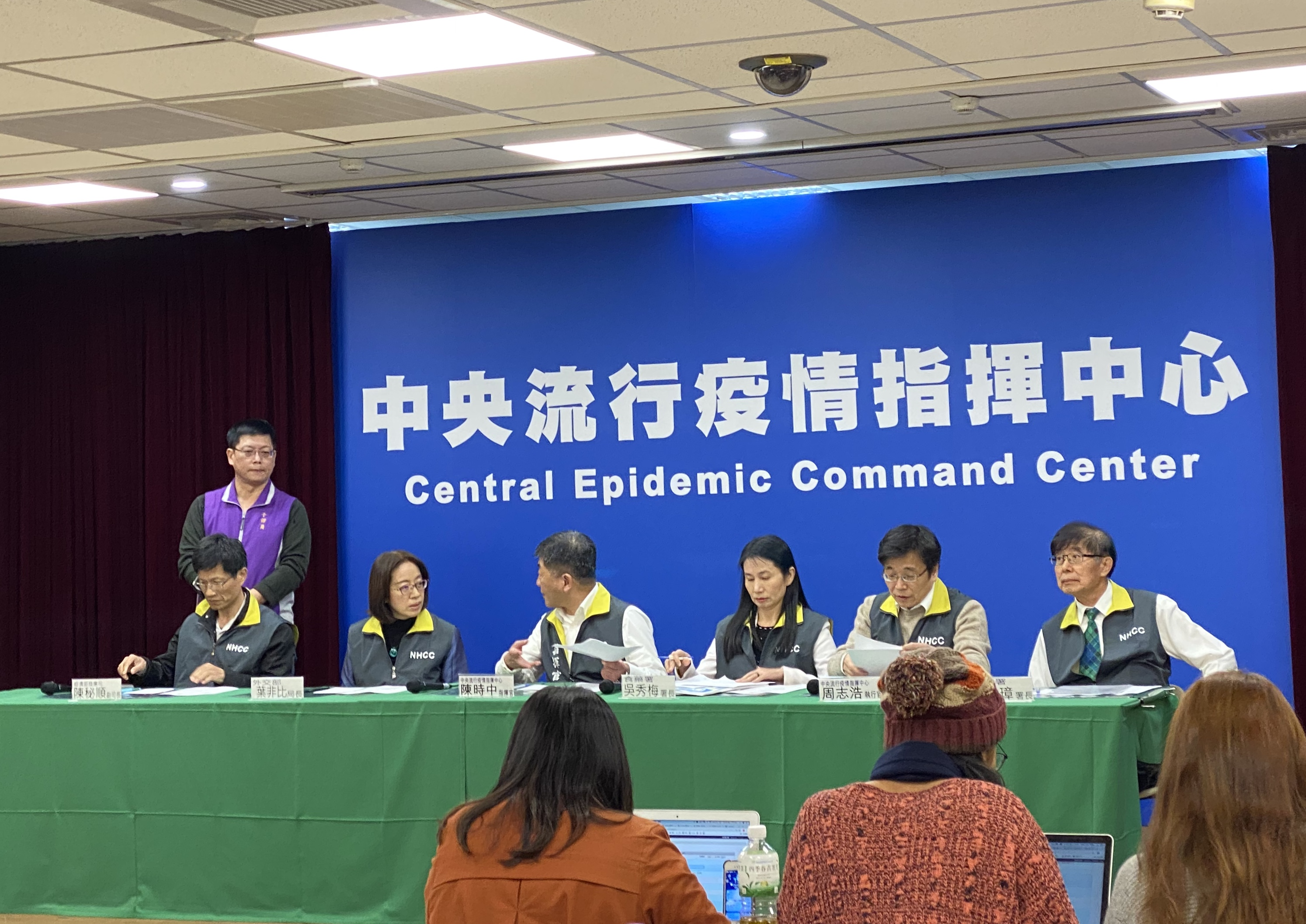 中央流行疫情指揮中心舉辦記者會。